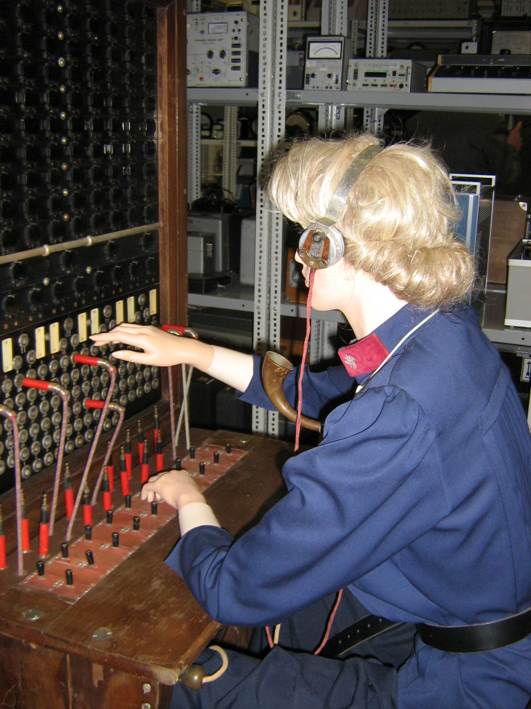 Kézi kapcsolásu LB telefonközpont, Miskolc Postamúzeum